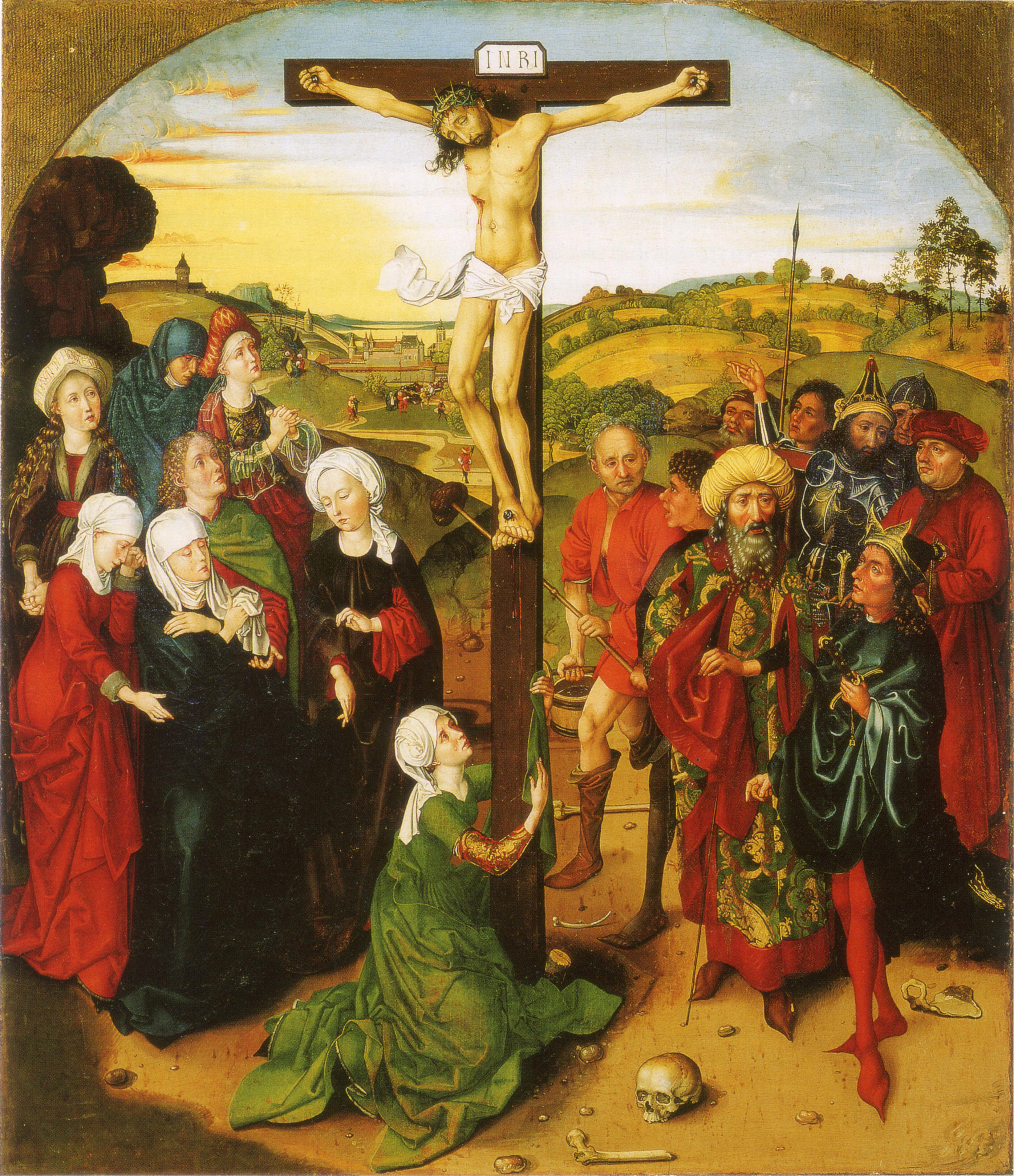 Mittelteil des Altarbildes der Marienkirche in Leipzig-Stötteritz